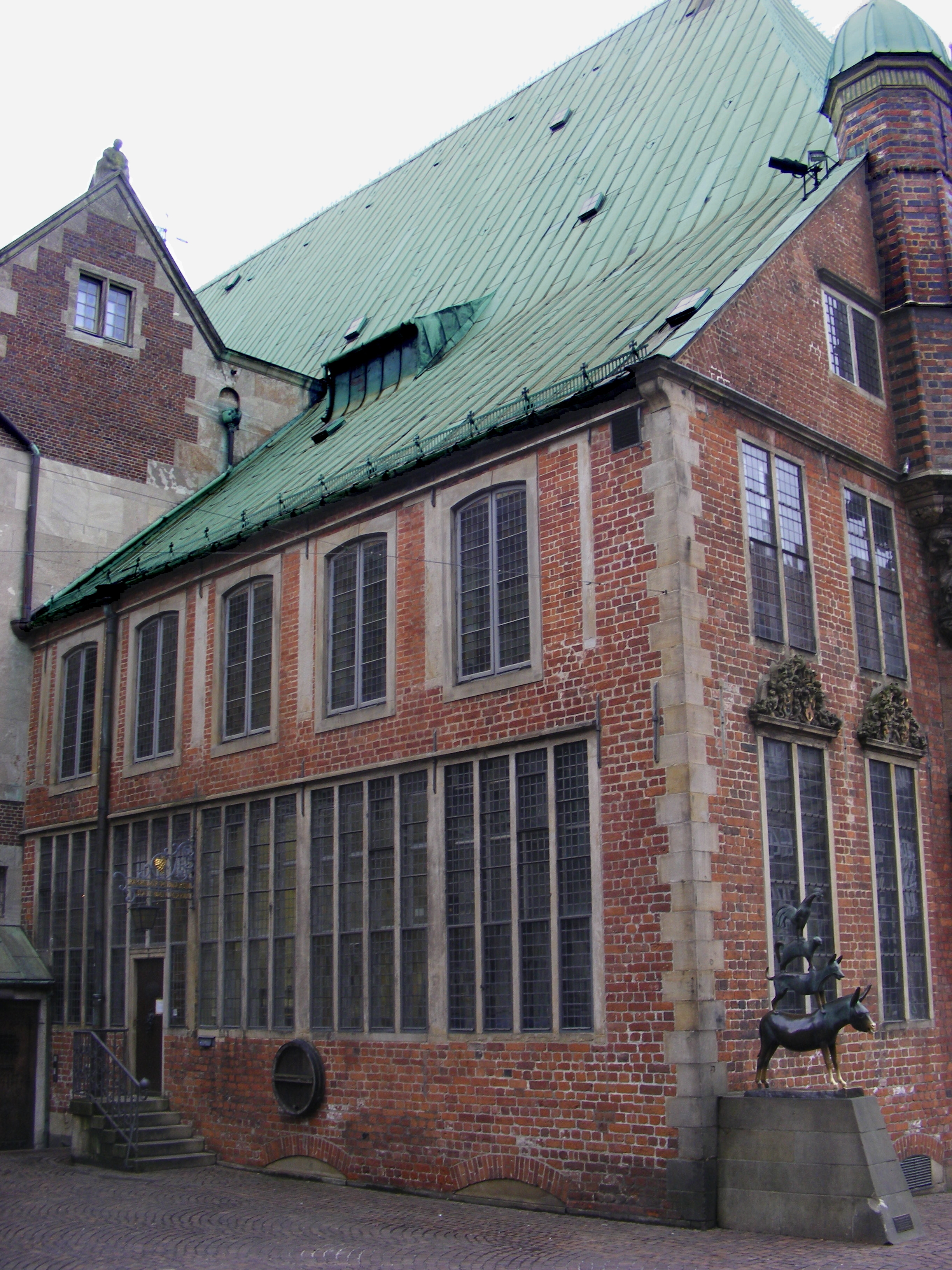 Kanzleianbau von 1682/83 an der Nordecke des Bremer Rathauses, rechts das letzte der urpsrünglich (1404/10) vier gotischen Treppentürmchen, unterhalb die Skulptur der Bremer Stadtmusikanten von 1953, links oben ein Giebel des Erweiterungsbaus von 1909/10 (sog. Neues Rathaus). Das eher modern aussehende Fensterband des Erdgeschosses ist von 1682/83. Die eher traditionell wirkenden Einzelfenster des Obergeschosses stammen aus einer unter knappen Geldmitteln erfolgten Sanierung im Jahre 1826.